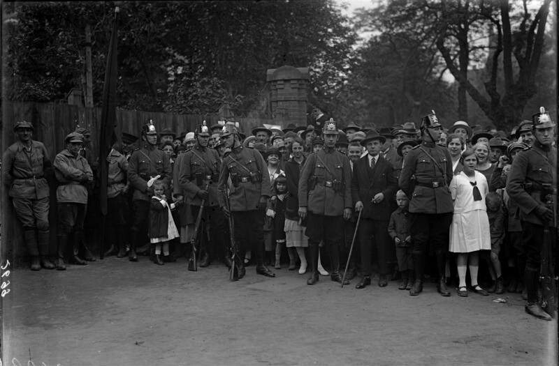 Rot-Front-Kämpfer-Tag in Berlin, Mai 1926 Schutzpolizei regelt den Andrang der Massen in der Hasenheide